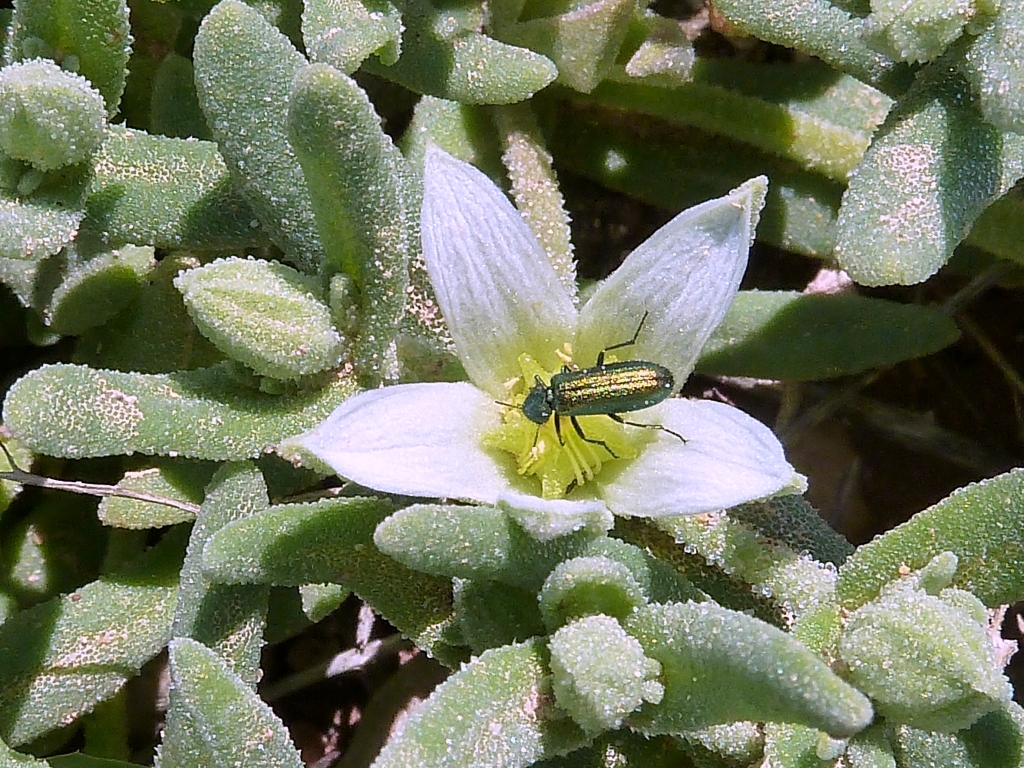 Aizoon hispanicum (Gazul) : Flor, detalle con tépalos, estambres, gineceo - con Psilothrix viridicaeruleus (Dasytidae)- José Cucú, El Tollo, Albatera (Provincia de Alicante, España).